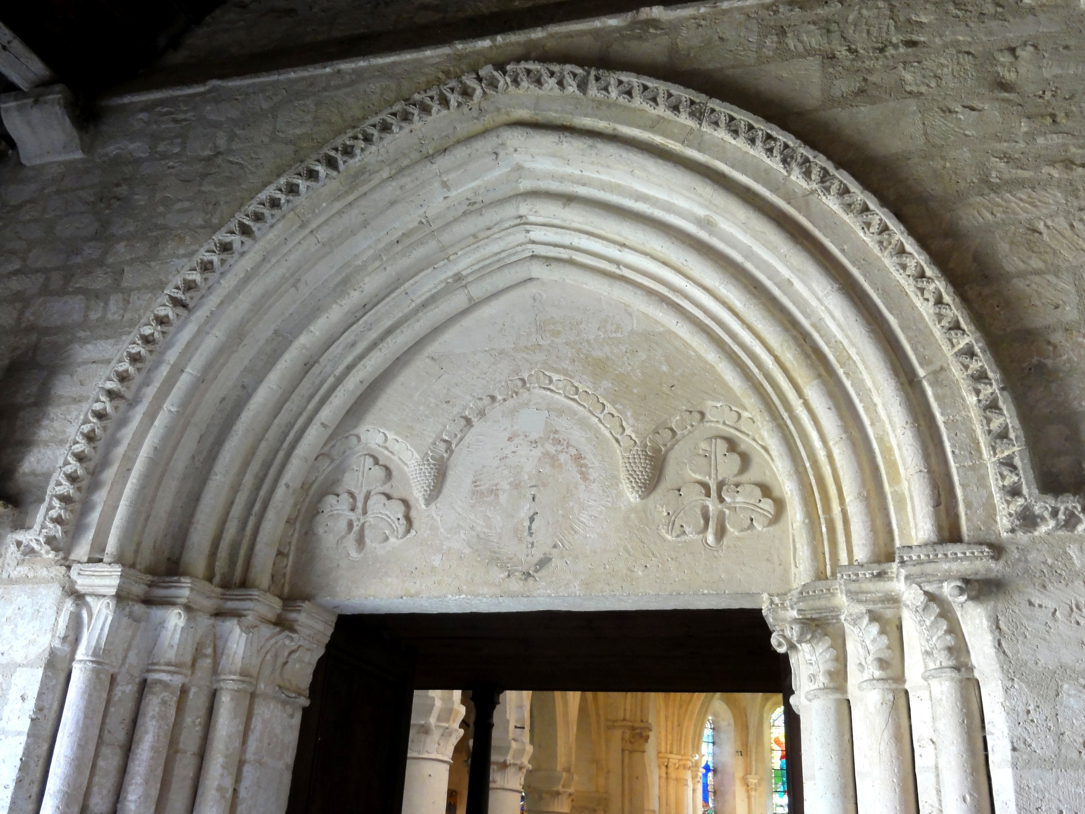 Tympan et archivolte du portail occidental.